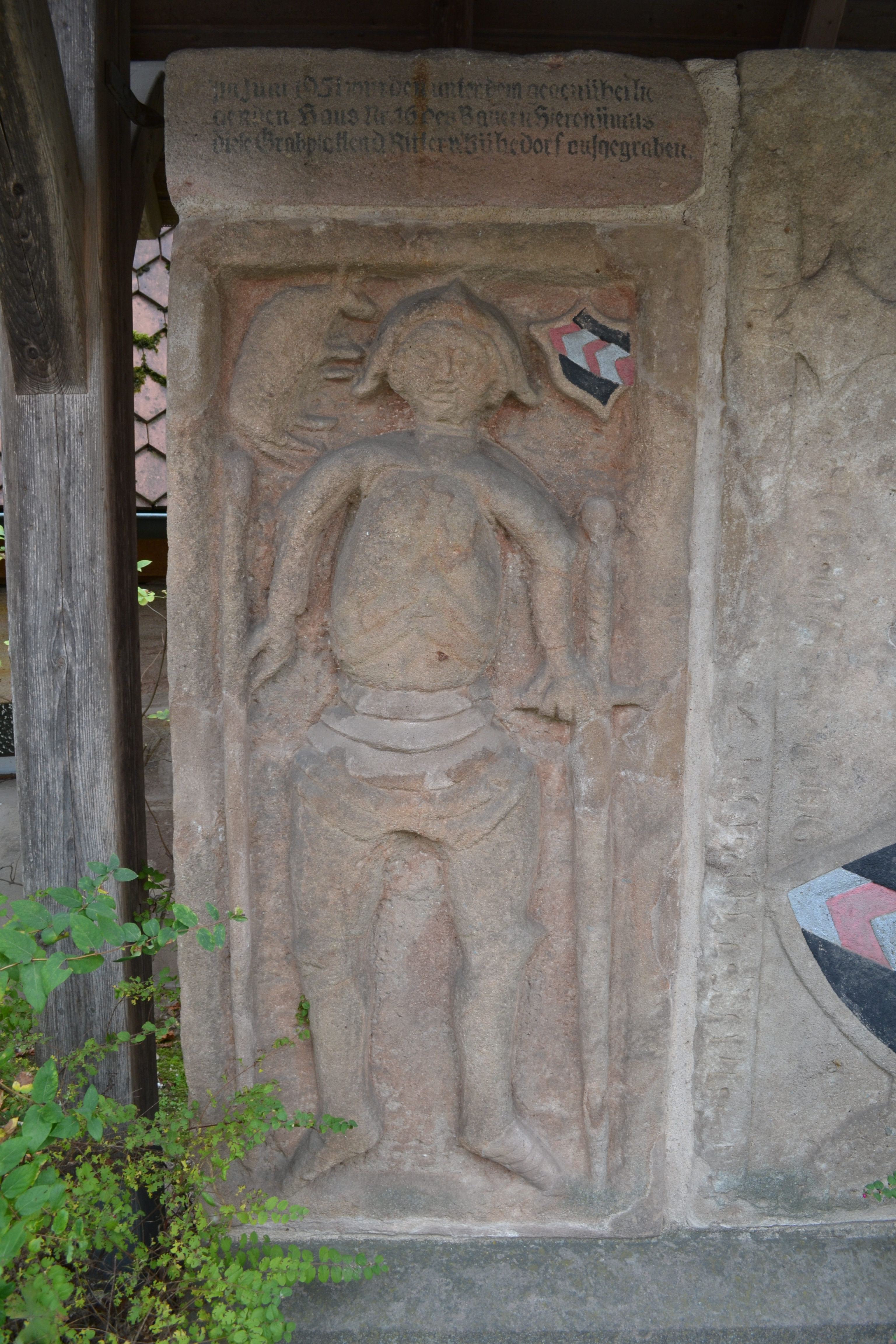 Die Grabplatte Konrads d.Ä. von Kühedorf ist zu besichtigen in Kühedorf, wo sie seit 1952 vor dem ehemaligen Burgareal aufgestellt ist